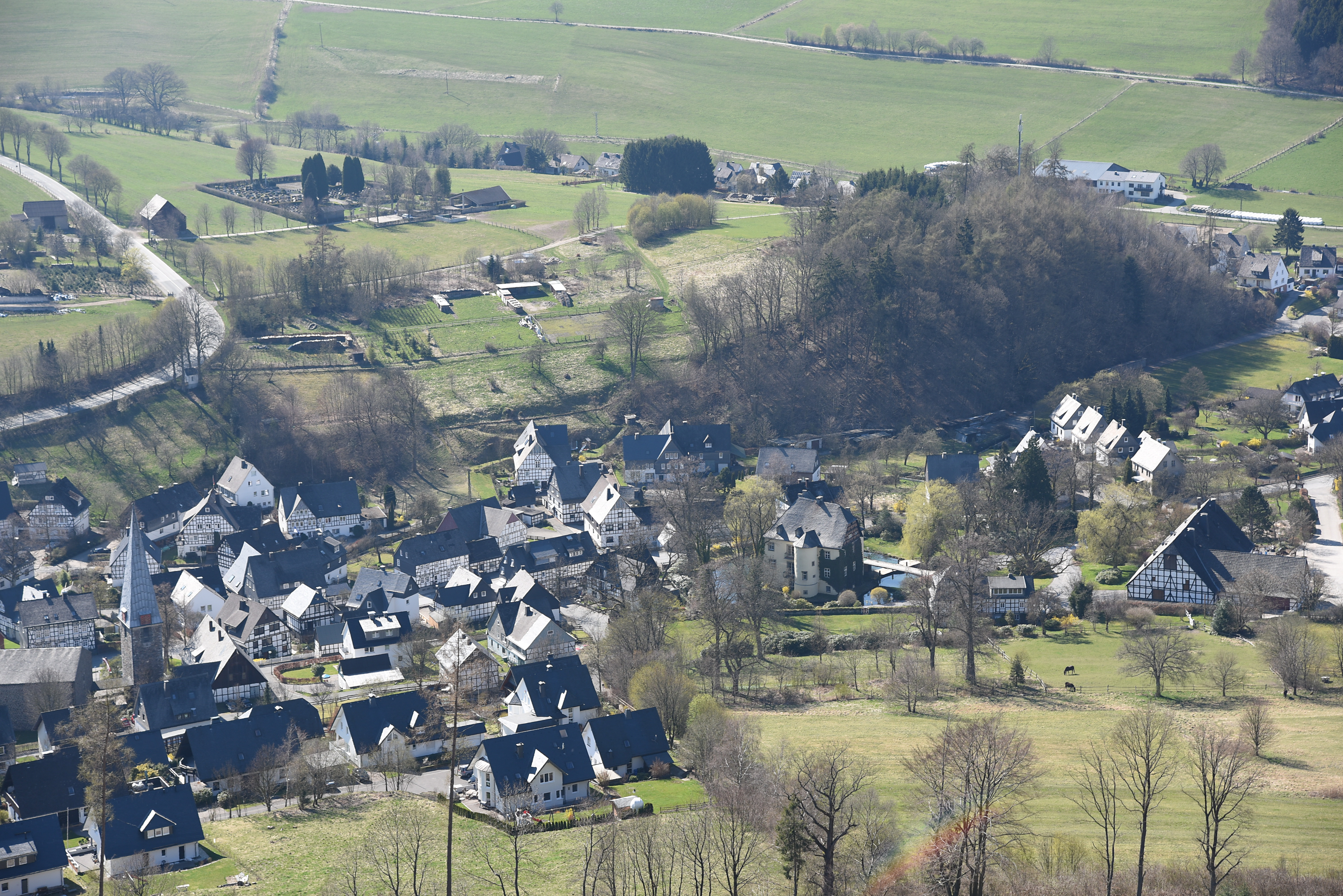 Bruchhausen ein Ortsteil der Stadt Olsberg im Hochsauerlandkreis